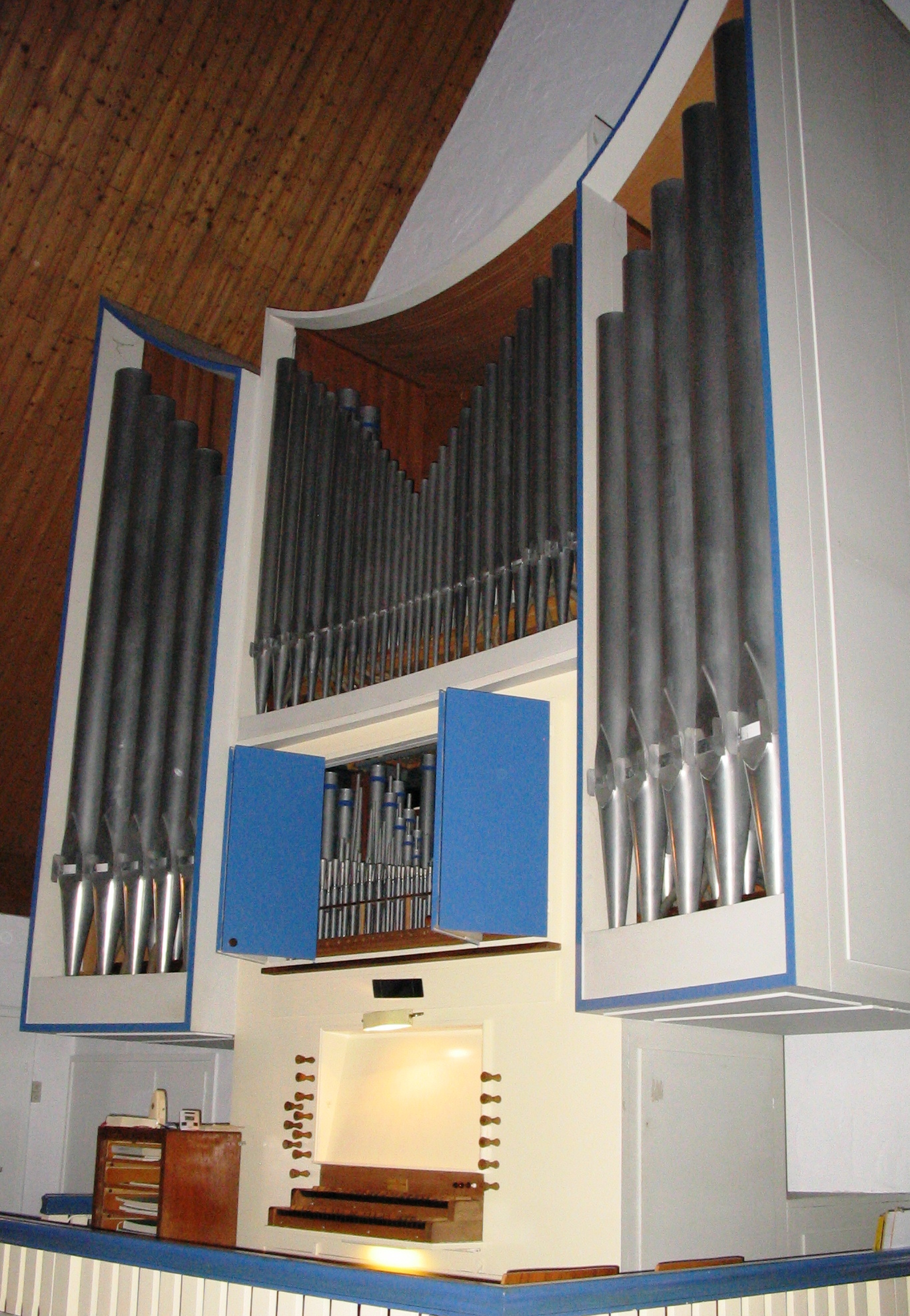 Ev. Inselkirche Juist, Führer-Orgel, Prospekt von rechts